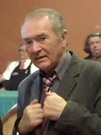 Jean-Paul Dupré, député-maire de Limoux